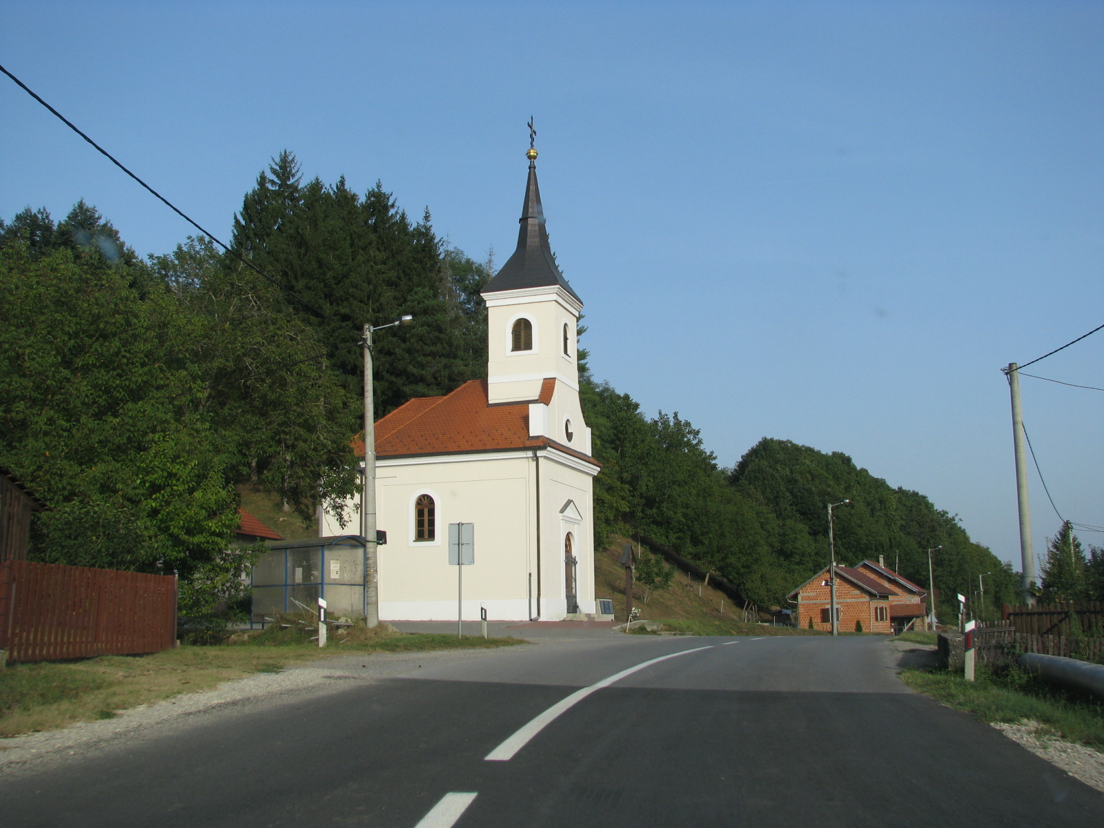 Crkva u Baćinu